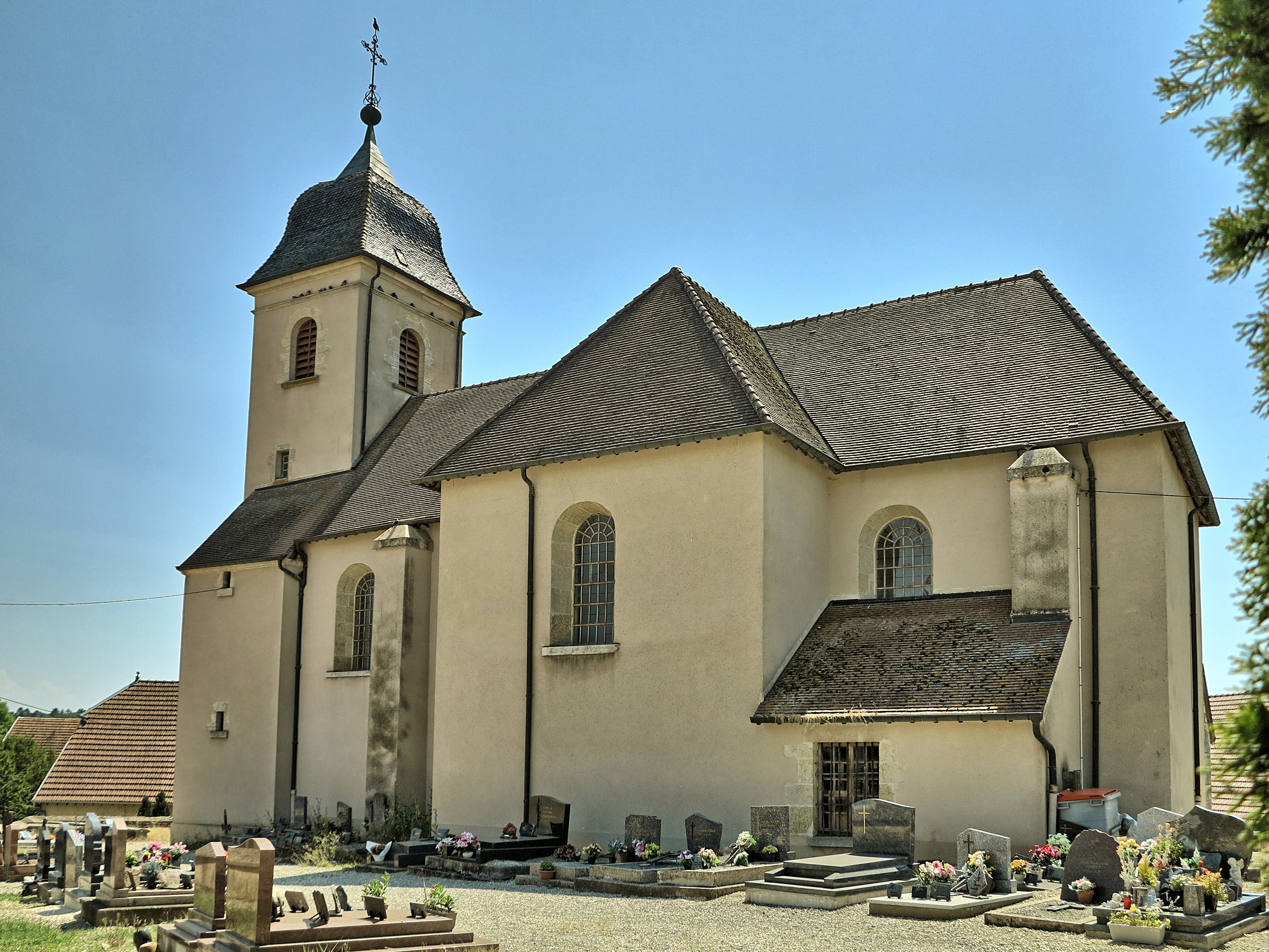 L'église de Sauvigney-lès-Gray